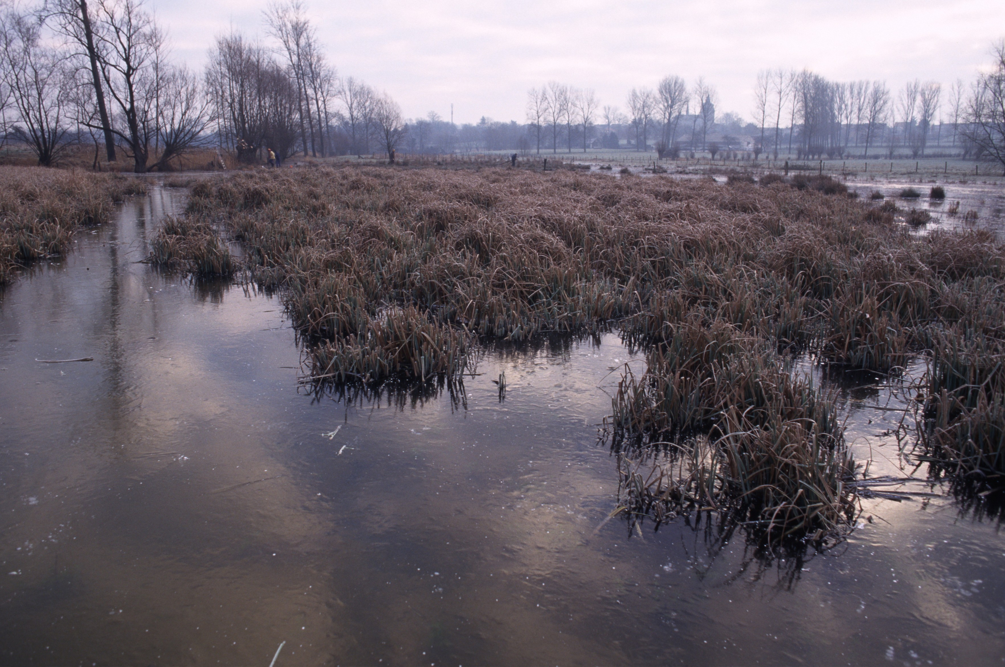 Volsembroek Sint-Pieters-Leeuw winter.